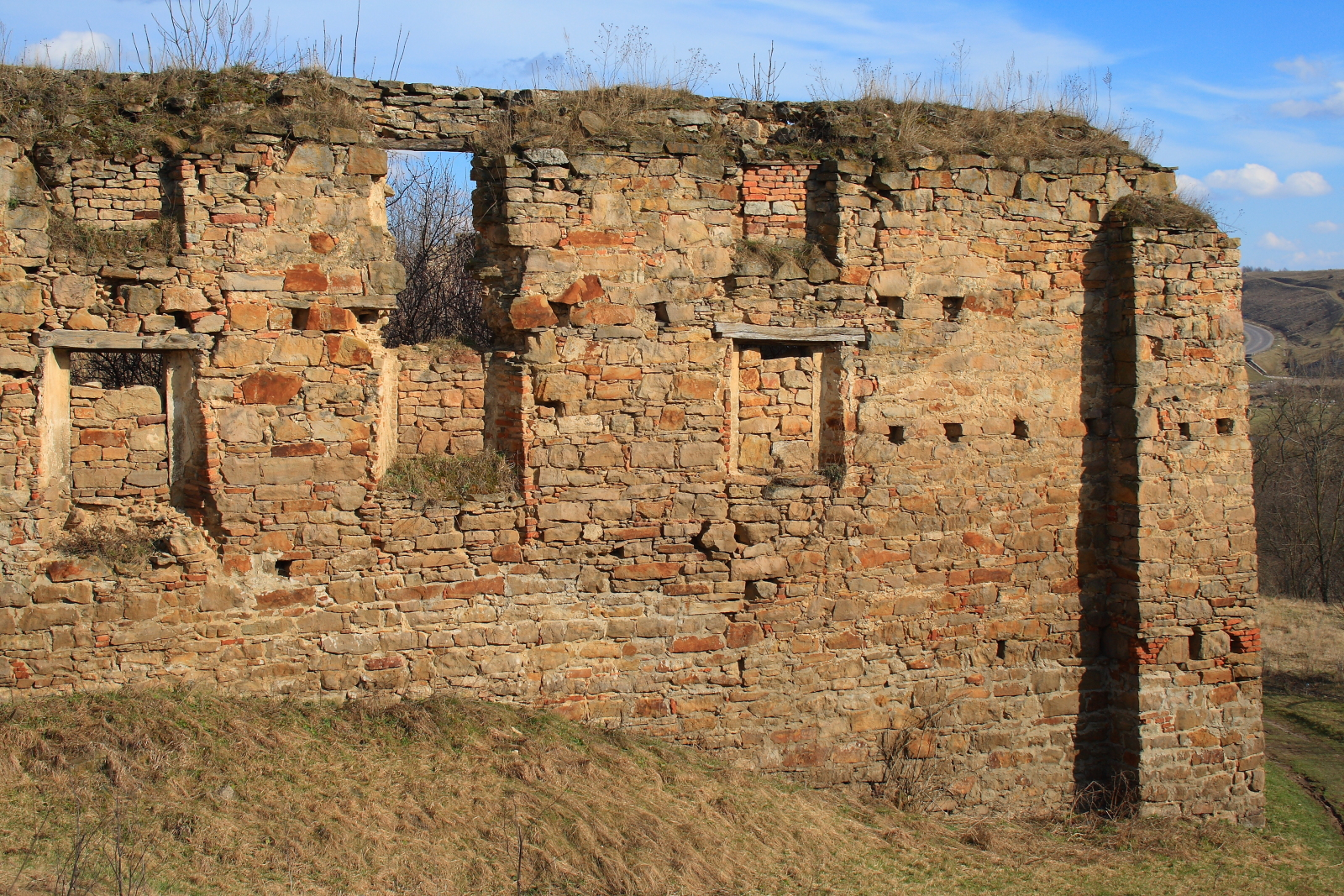 Микулинці